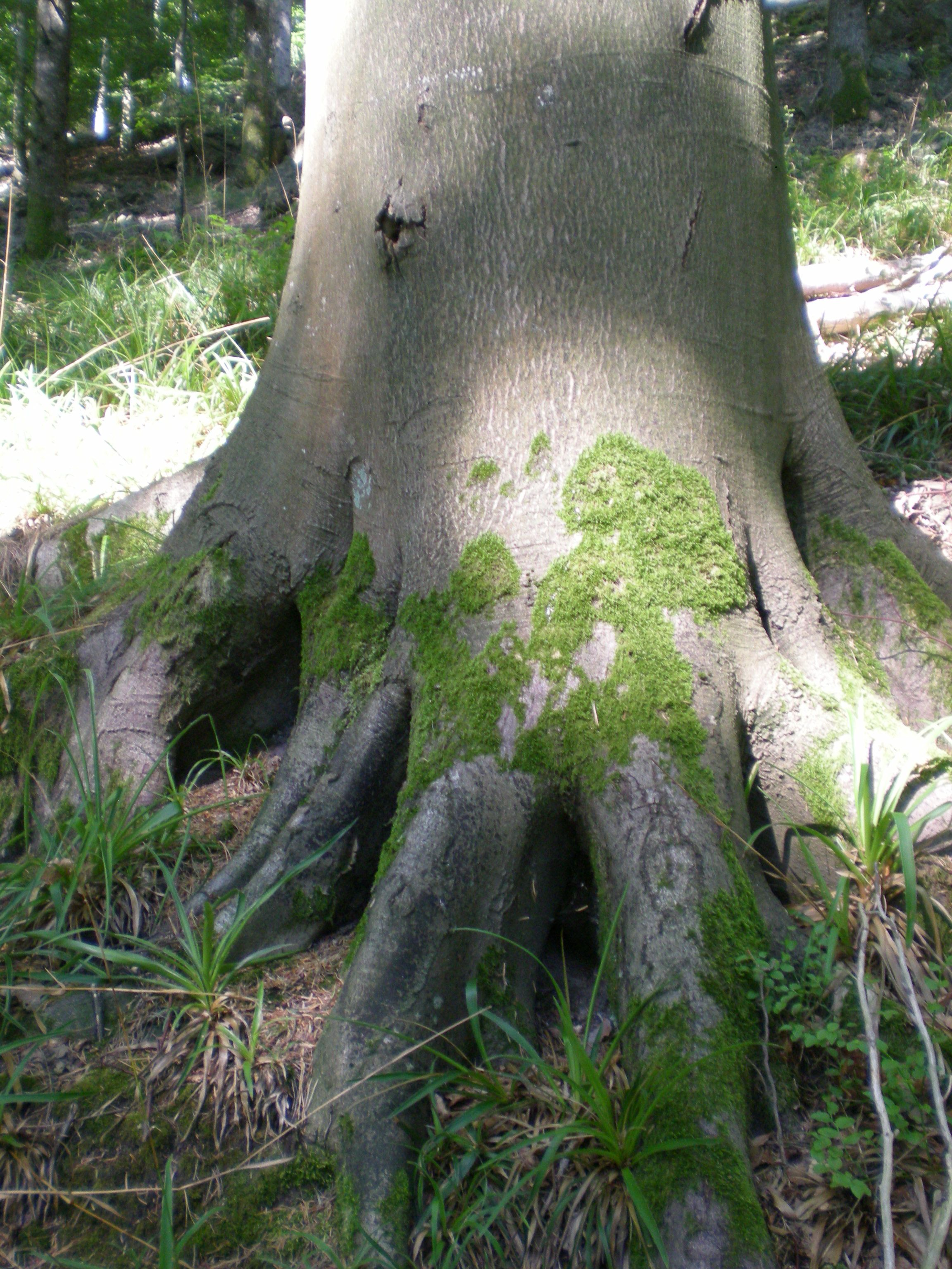 Stammfußhöhle mit Moosbewuchs